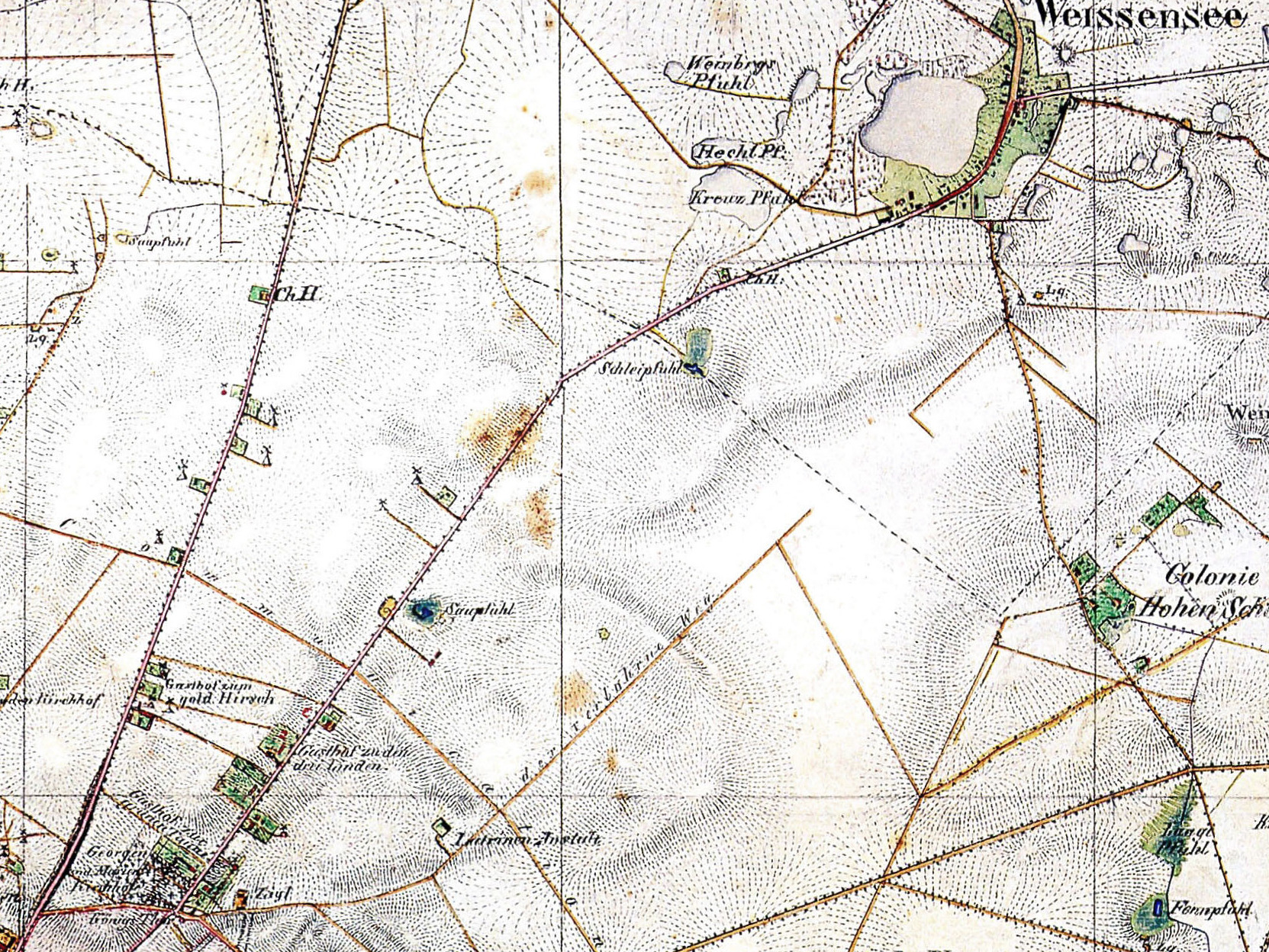 "Grad Abtheilung 53°/52° der Breite, 31°/32° der Länge; Bande VI. Blatt 1". Unter dem Blatt steht: "Die südliche Hälfte aufgenommen 1825 in 1/12500 Masstab, und 1832 in den Masstab 1/25000 reduciert von dem Ingenieur Geographen: Glaeser" und "Die nördliche Hälfte ist aufgenommen in Monat Juni und Juli 1831, durch Maull Ingenieur Geograph."